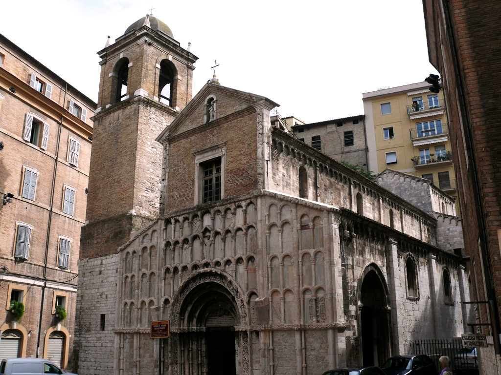 Ancona, Santa Maria Della Piazza